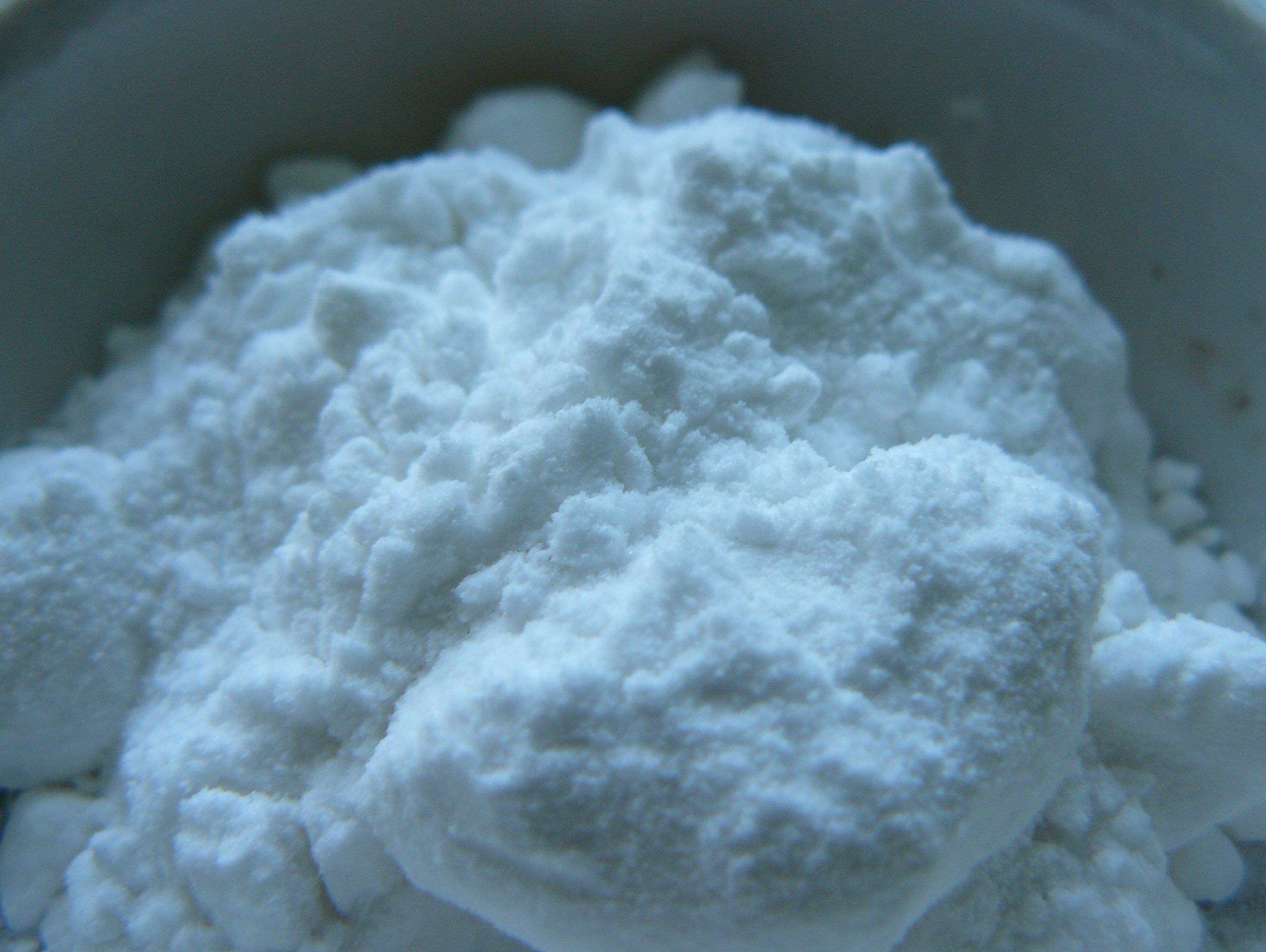 Kryształy chloranu (V) potasu w parowniczce